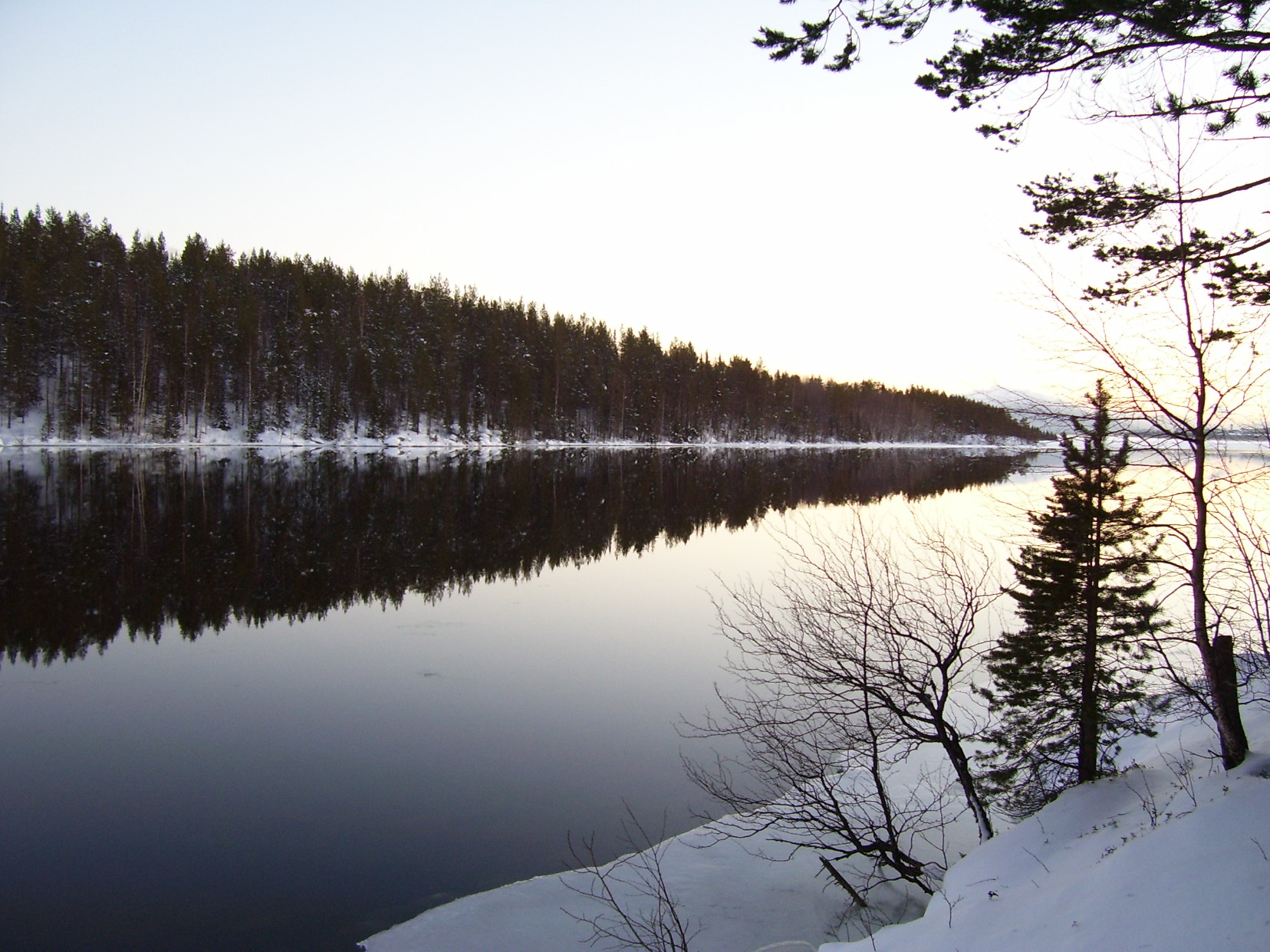 Река Нива